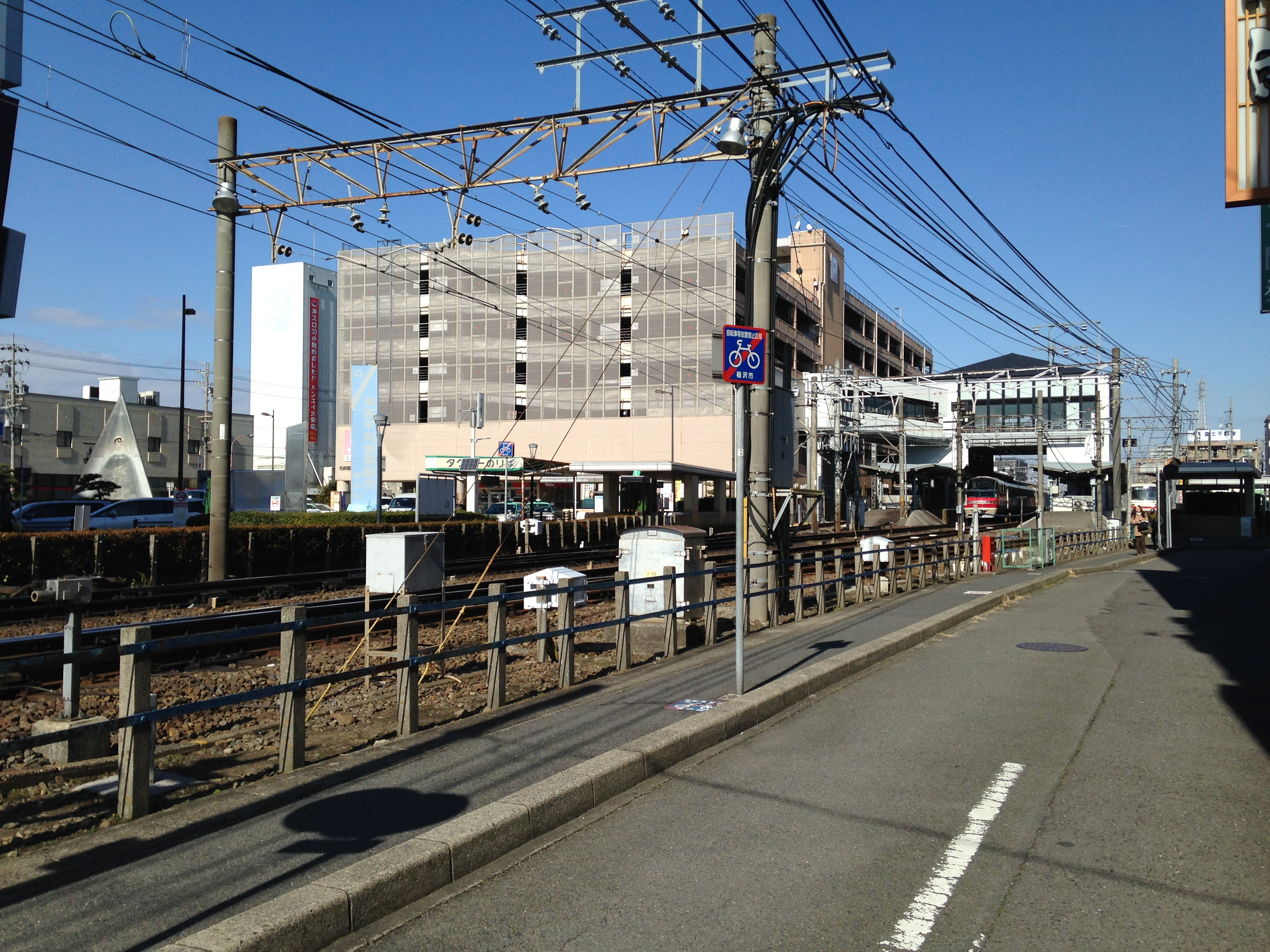 南東側より望む国府宮駅